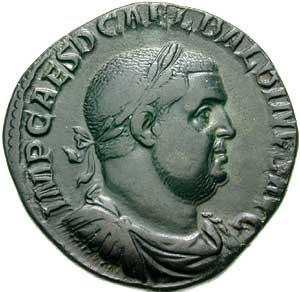 Portret van keizer Balbinus op een Romeinse sestertie.